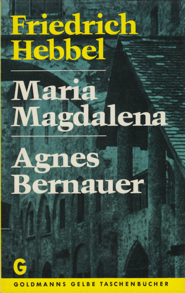 Friedrich Hebbel: Maria Magdalena, Agnes Bernauer. Wilhelm Goldmann Verlag, München 1968. DNB